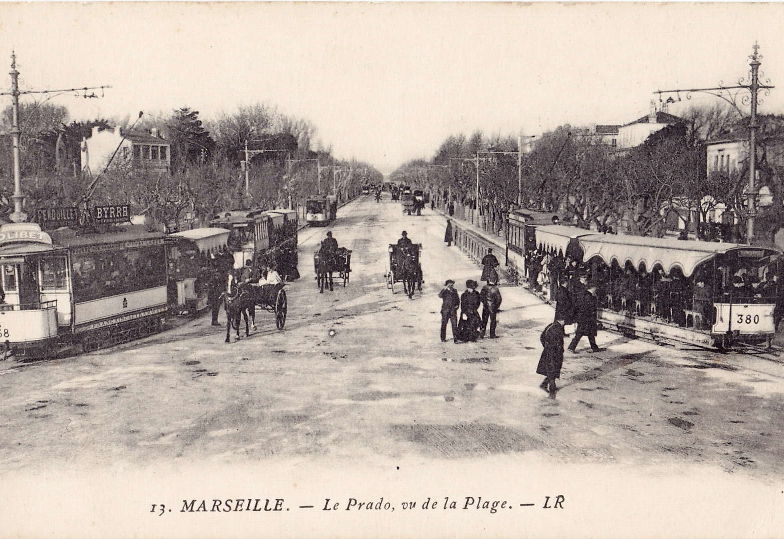 Carte postale ancienne éditée par L R, n°13: MARSEILLE - Le Prado, vu de la Plage